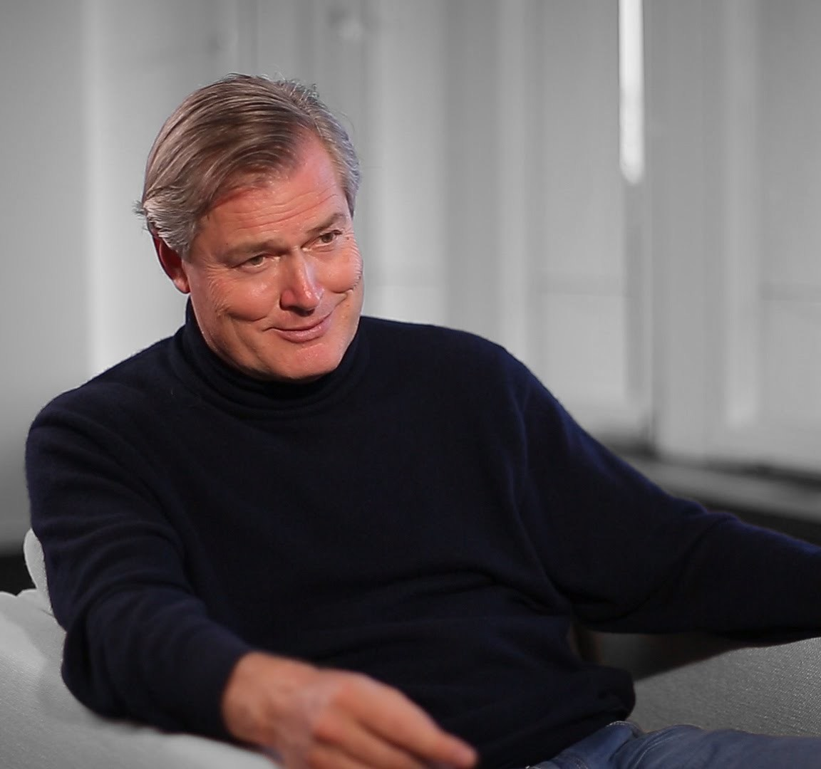 Papier aus Steinstaub, der als Abfallprodukt im Bergbau anfällt? Mit unkonventionellen Ideen will die Blue Economy umweltschonende Produktion voranbringen...